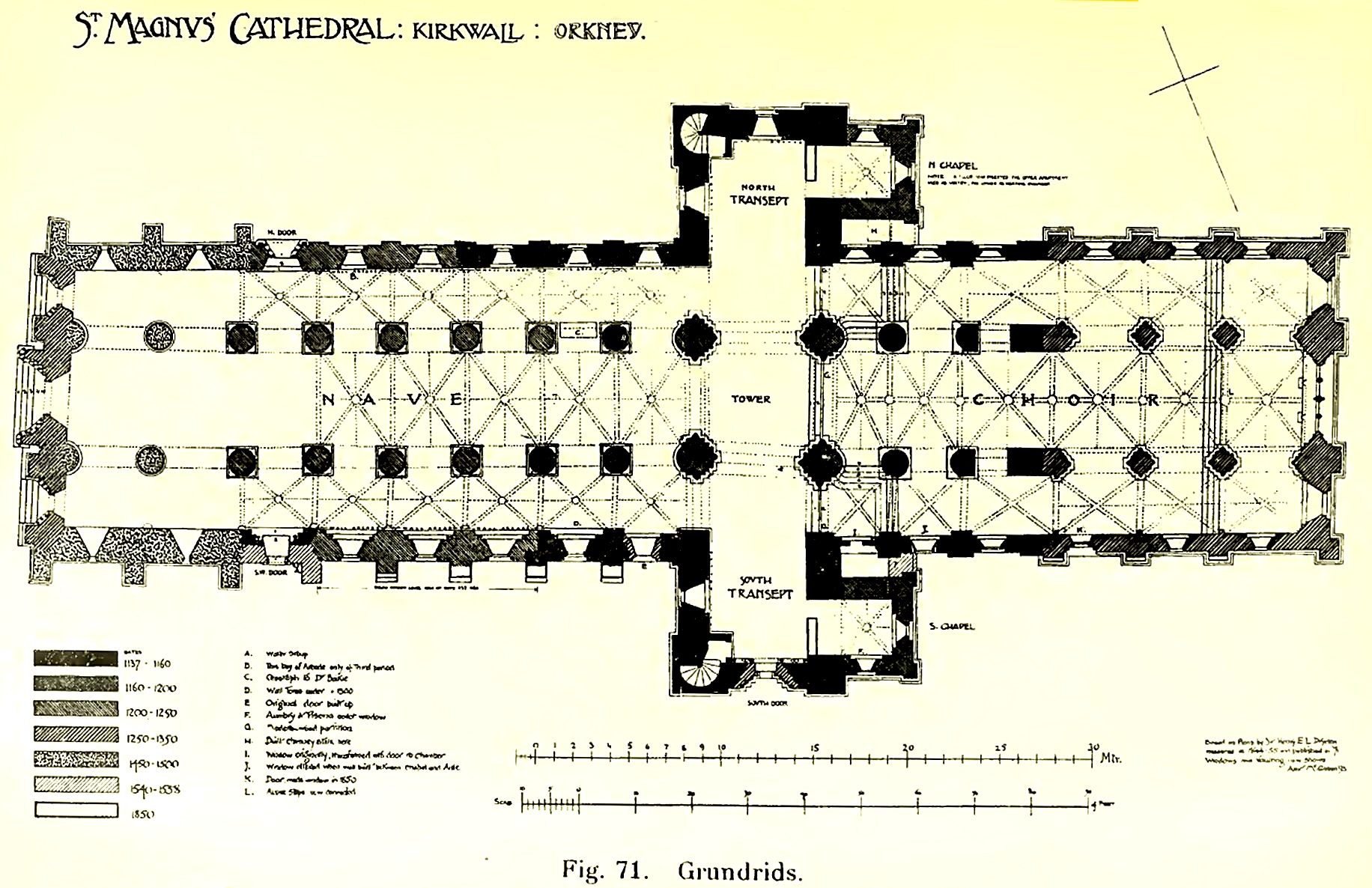 Grunnriss av St. Magnuskatedralen, som viser dei ulike byggestega.